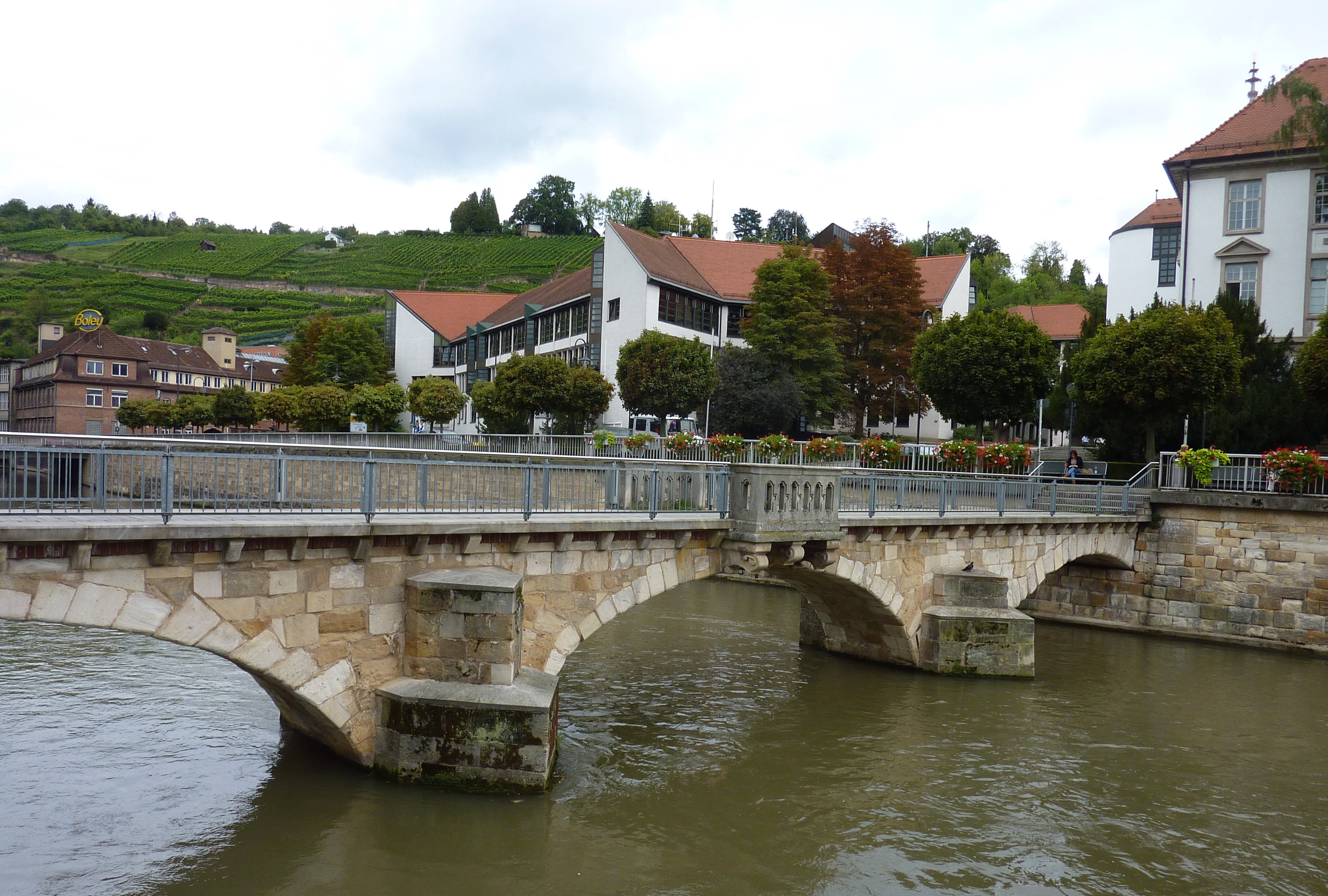 Agnessteg in Esslingen, Blick nach Westen